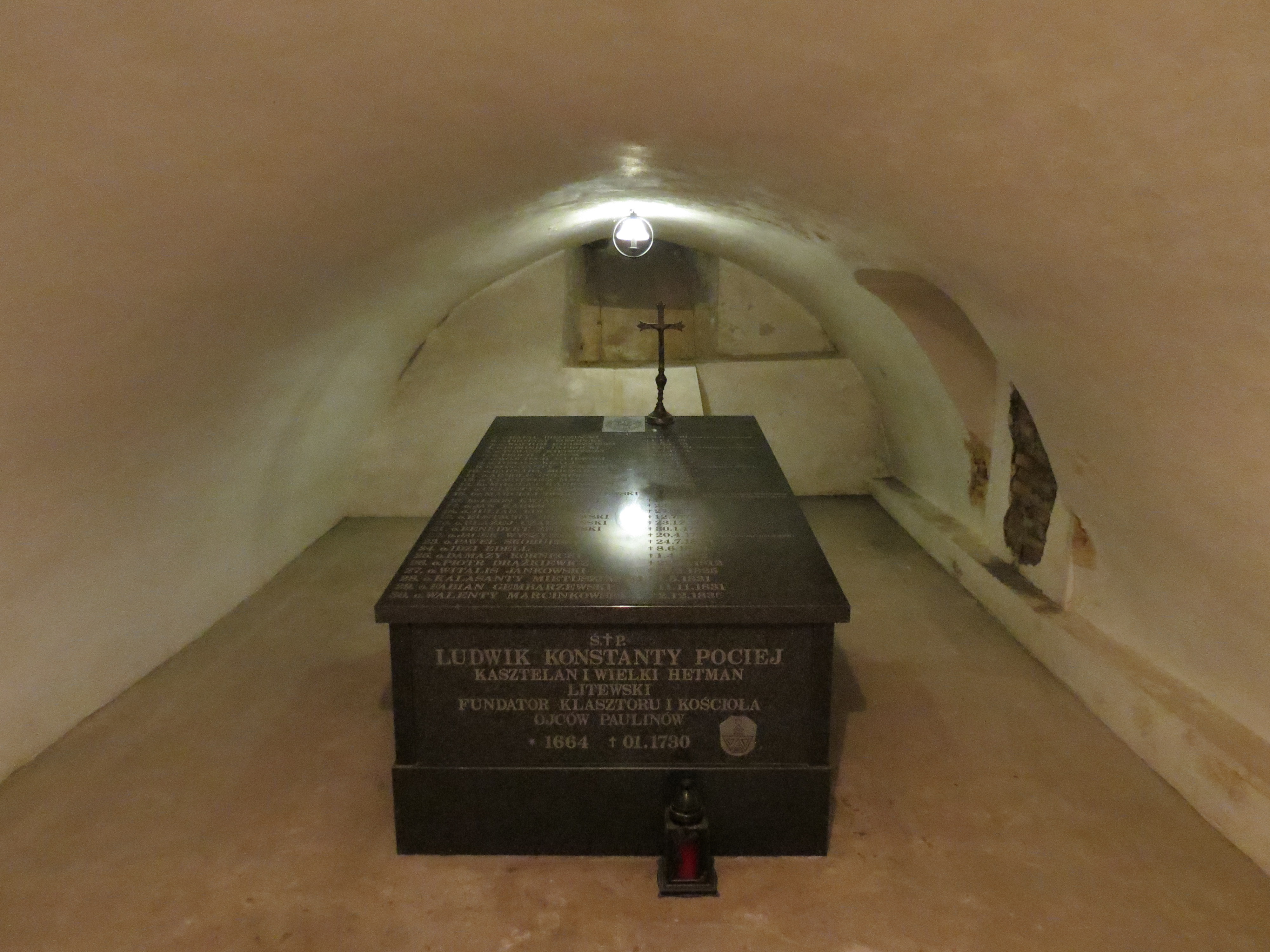 Włodawa, kościół, ob. par. p.w. św. Ludwika, XVIII